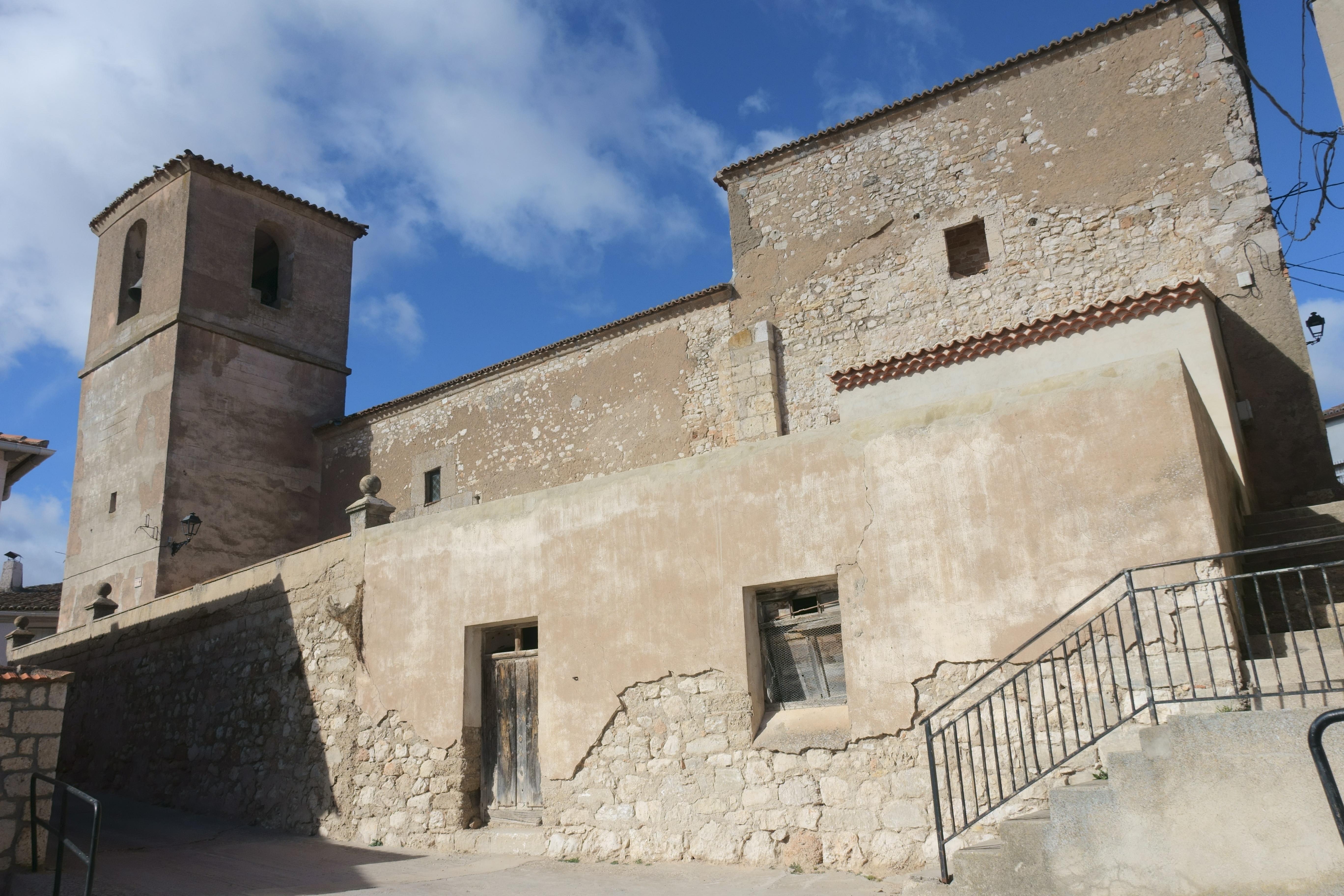 Iglesia de Nuestra Señora de la Asunción, en Cendejas de la Torre (Guadalajara, España).